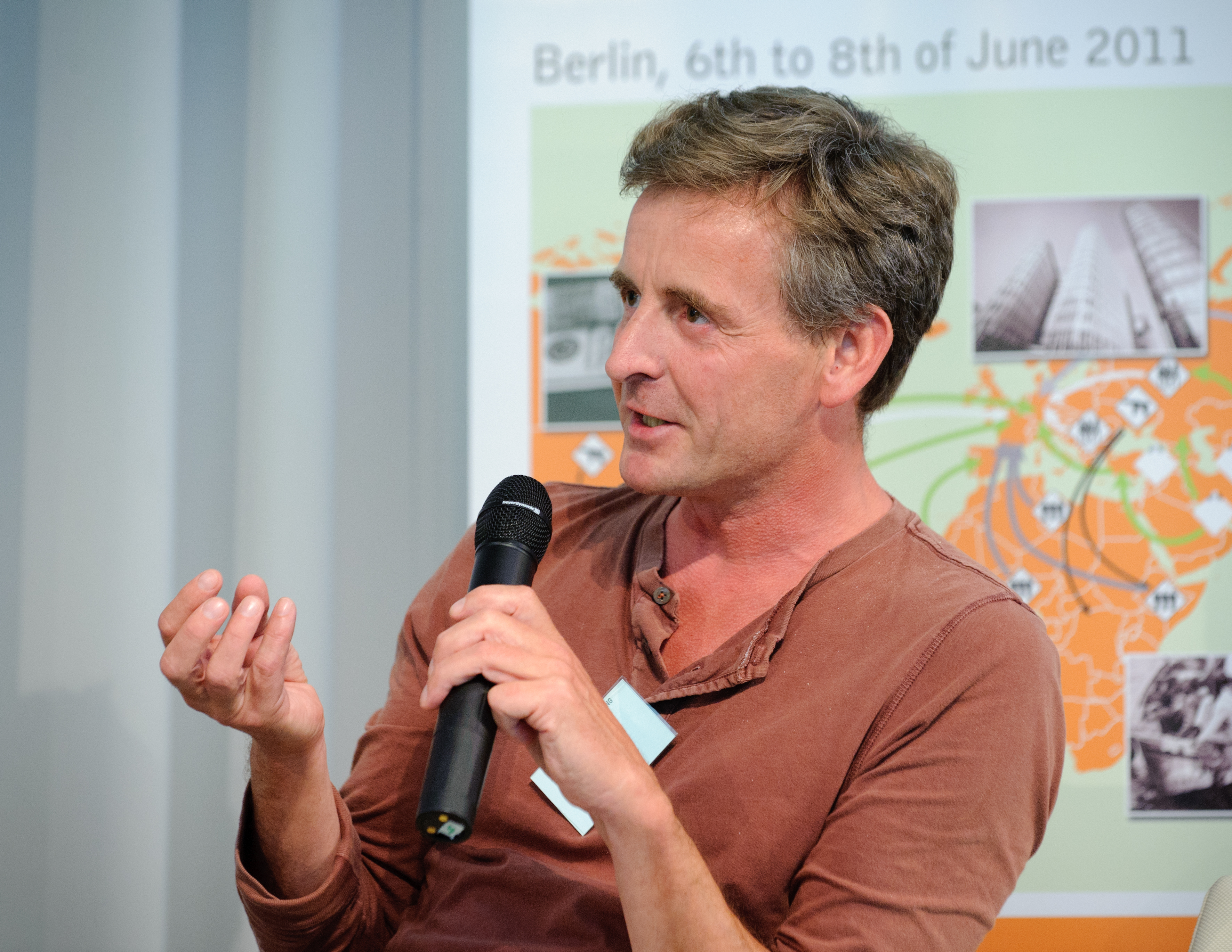 Prof. Klaus Schlichte (Politikwissenschaftler, Uni Bremen) Foto: Stephan Röhl